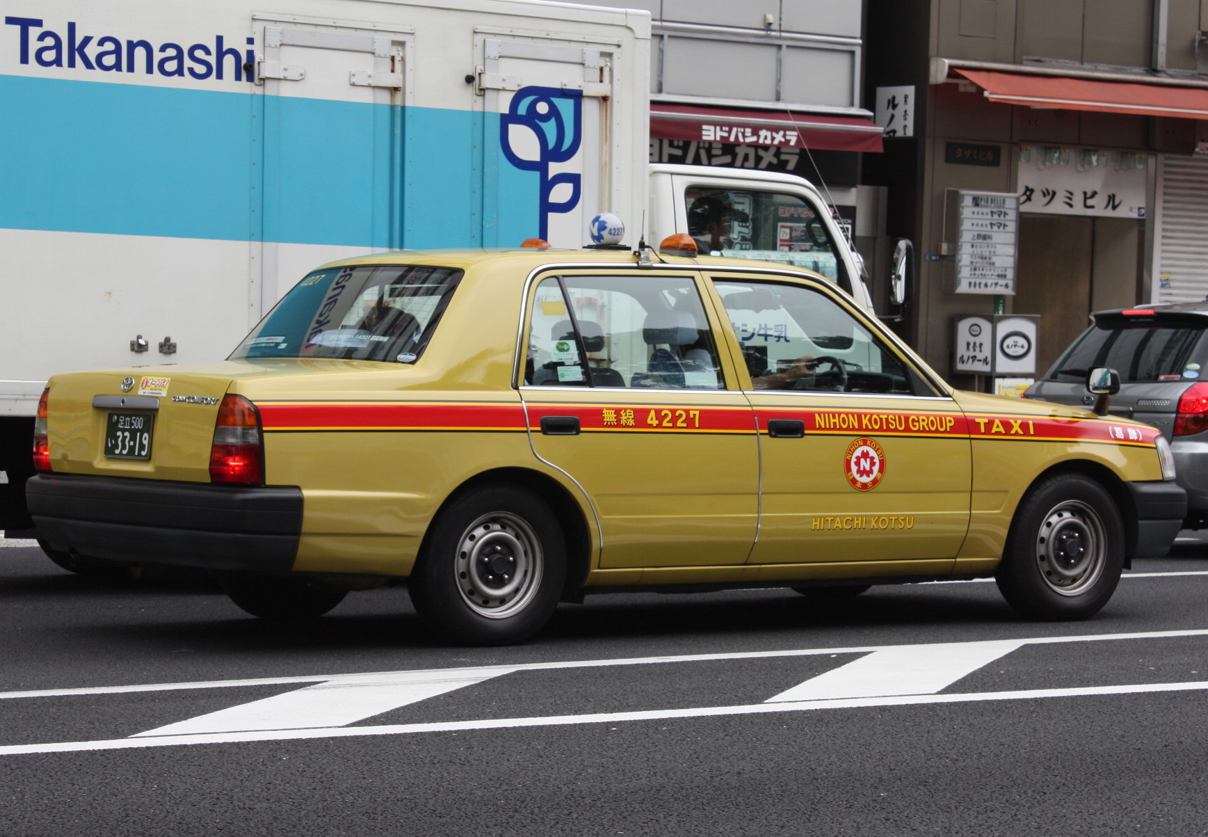 日本交通のタクシー トヨタ・コンフォート 上野駅付近にて撮影